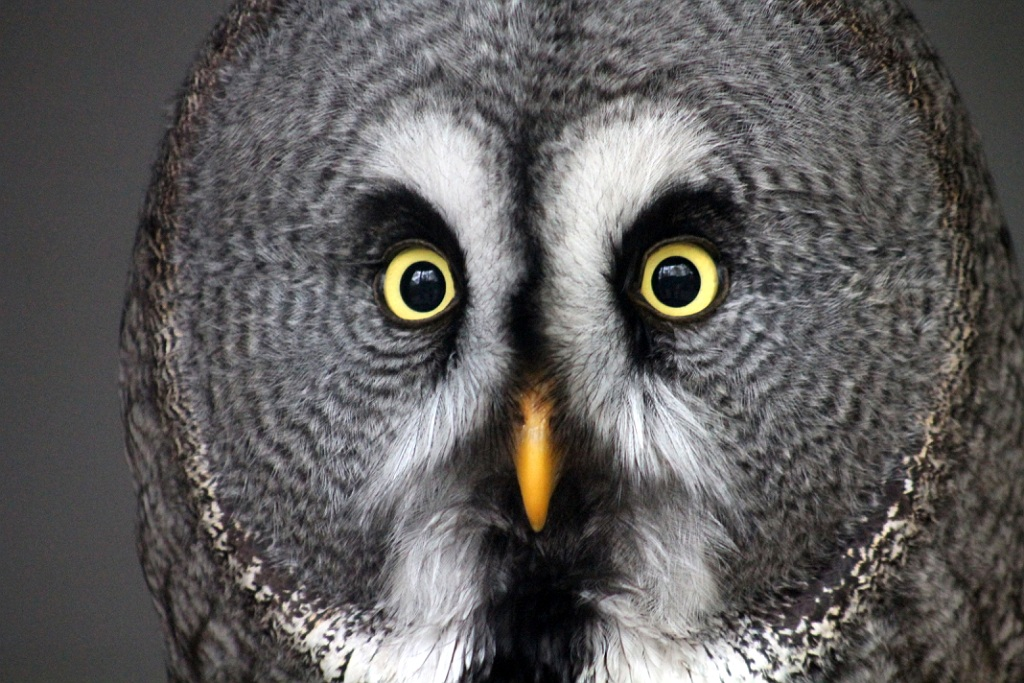 Laplanduil in Zoo Veldhoven, Nederland